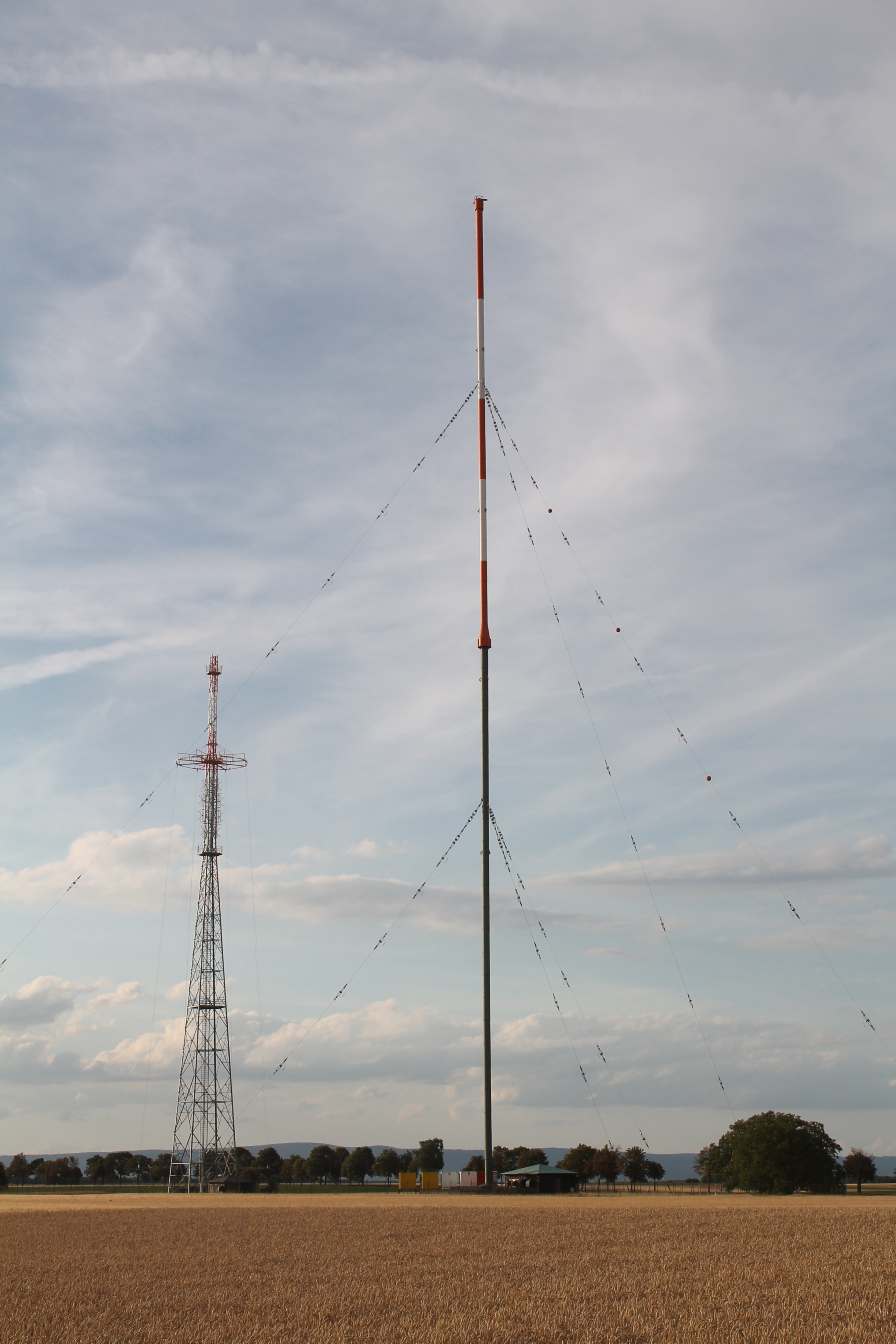 Hauptsendemast und Sendeturm des Rheinsenders - OpenStreetMap(Info)